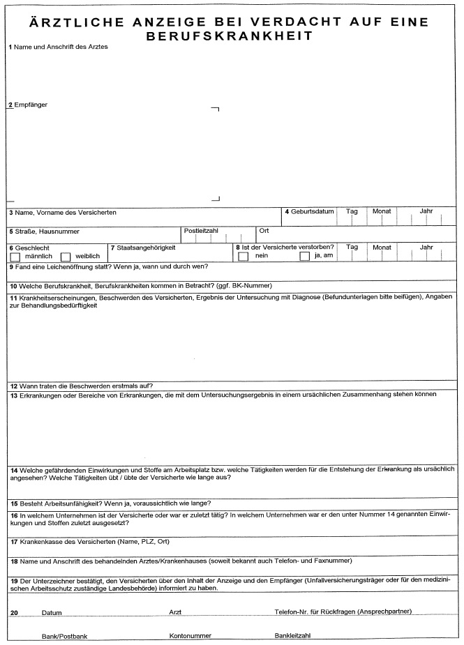 Muster einer ärztlichen Anzeige bei Verdacht einer Berufskrankheit